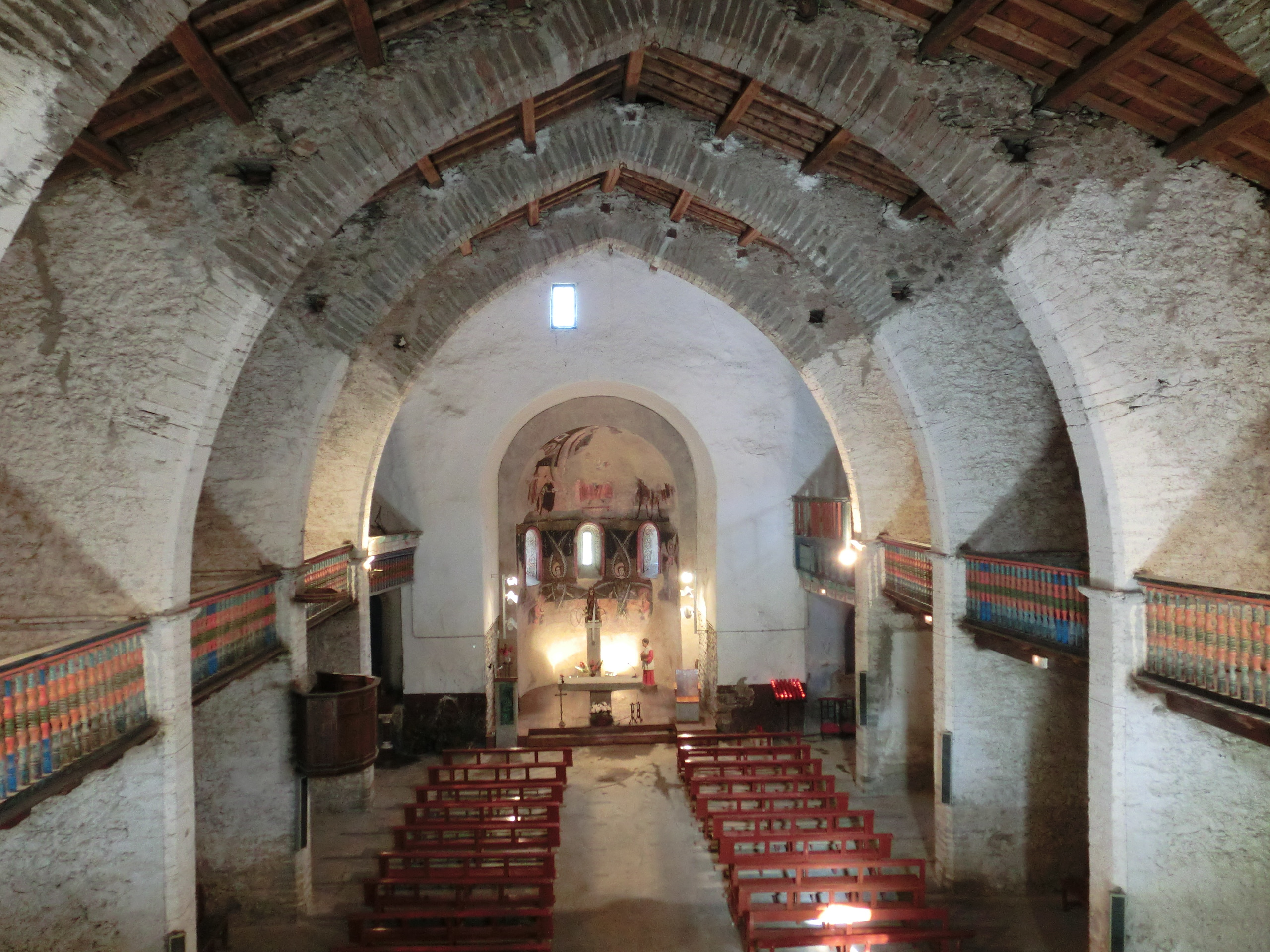 Interior (des del presbiteri) de l'església de Santa Maria d'Àneu (la Guingueta d'Àneu, Pallars Sobirà, Catalunya)